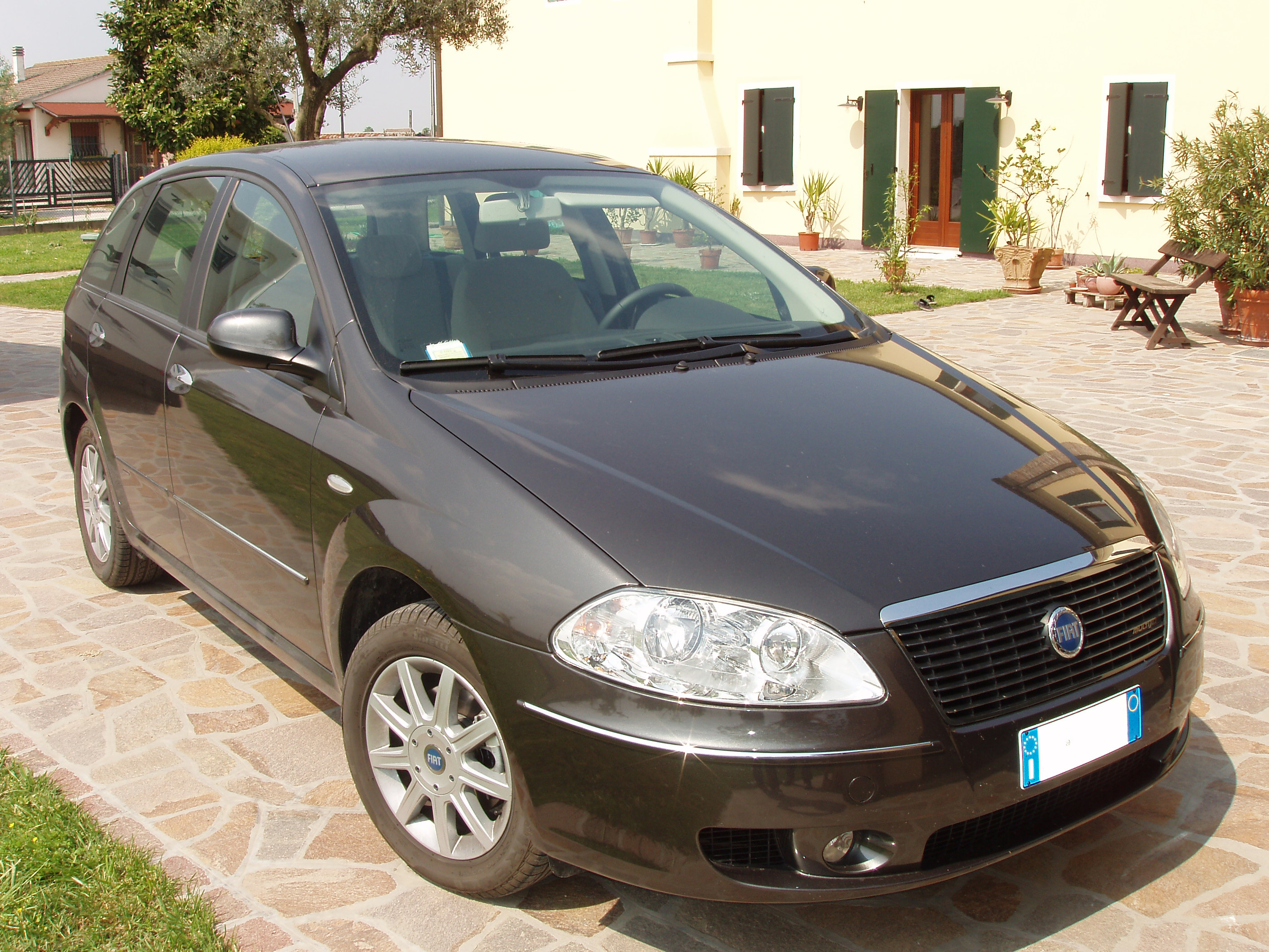 Fiat Croma (2005) prima del Restyling